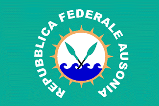 Bandera de la Rep. Federal d'Ausònia